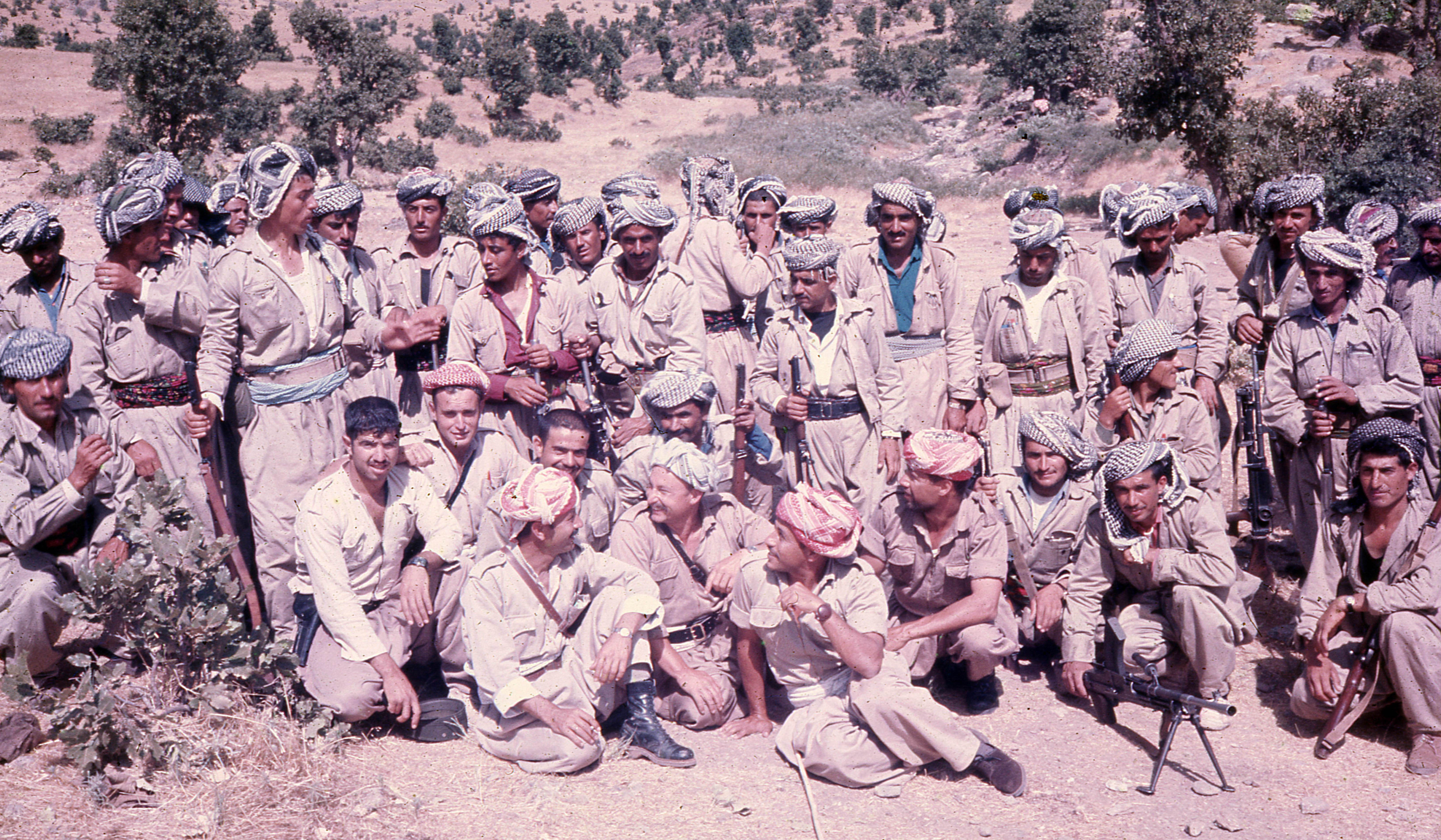 יוסי ג'ינו בכורדיסטאן